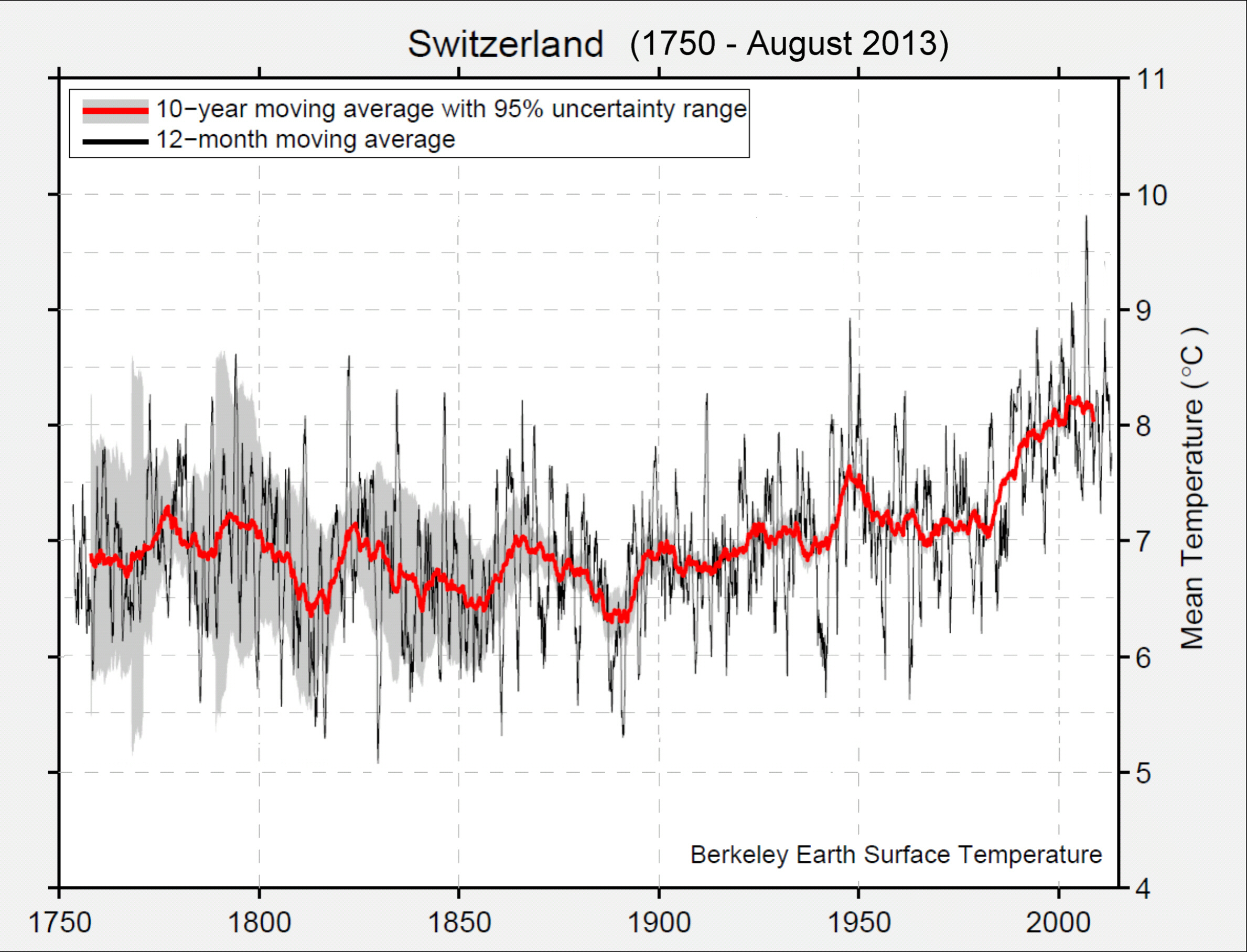 Mittlere Jahrestemperaturen in der Schweiz 1750 bis August 2013 als gleitende 12-Monatsmittel. 10-Jahresmittelwerte (rot). - Originaldaten aller Wetterstationen, durch Berkeley Earth (USA) validiert und harmonisert